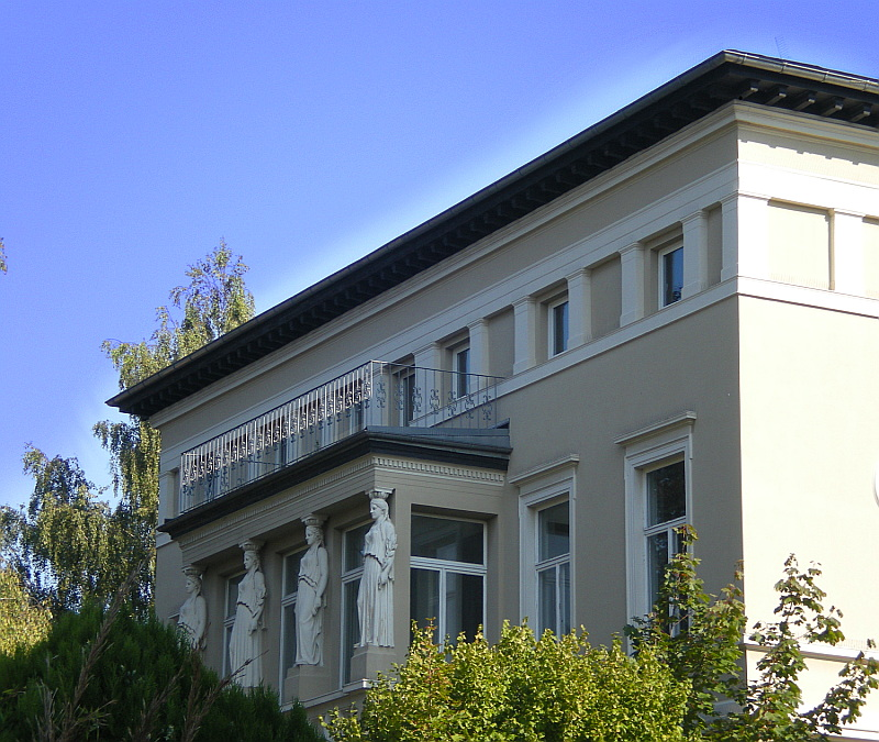 Villa Schmidt, Gagarinstraße 30, Gera, Thüringen